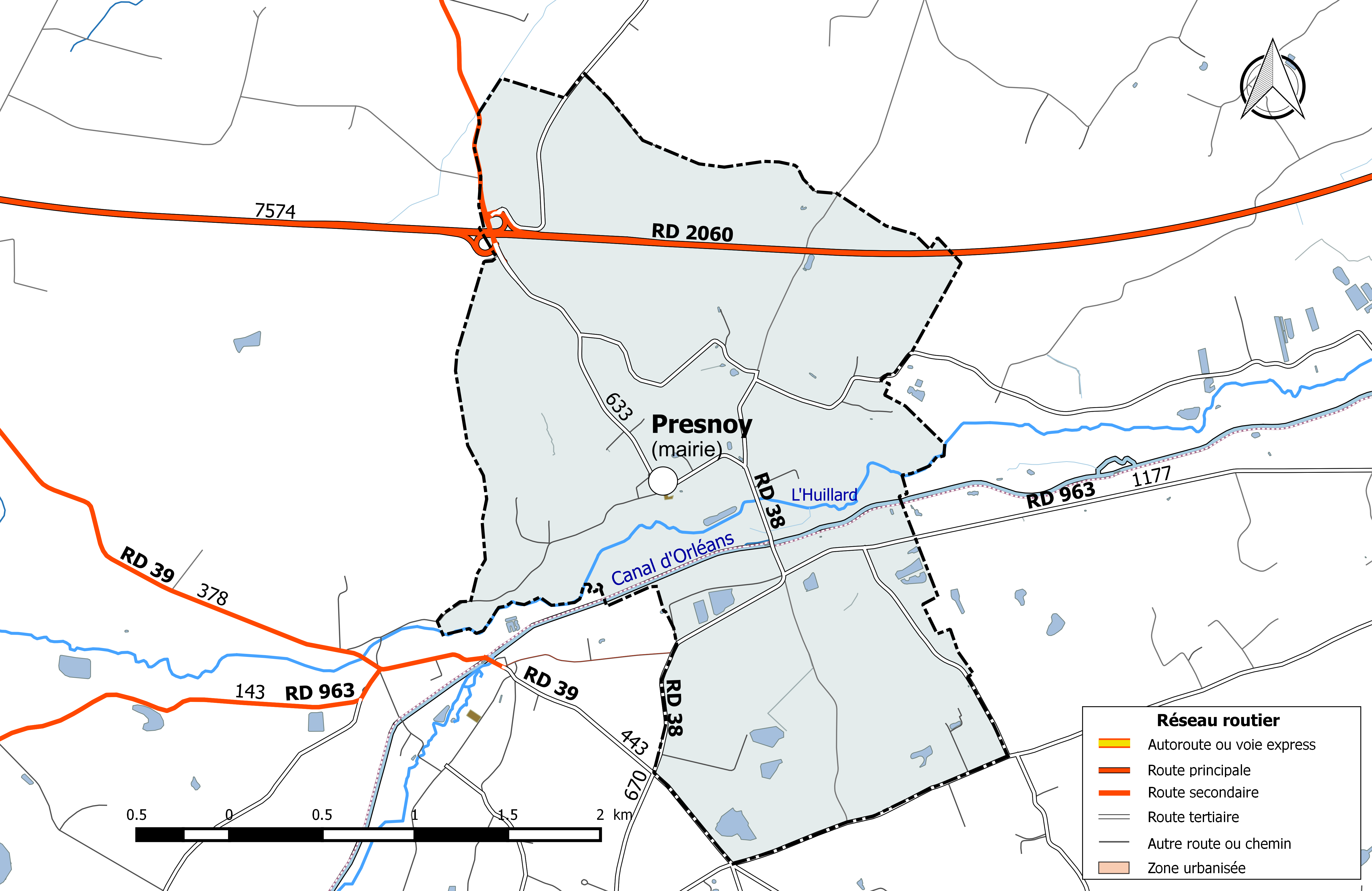 Carte du réseau routier de la commune de Presnoy.